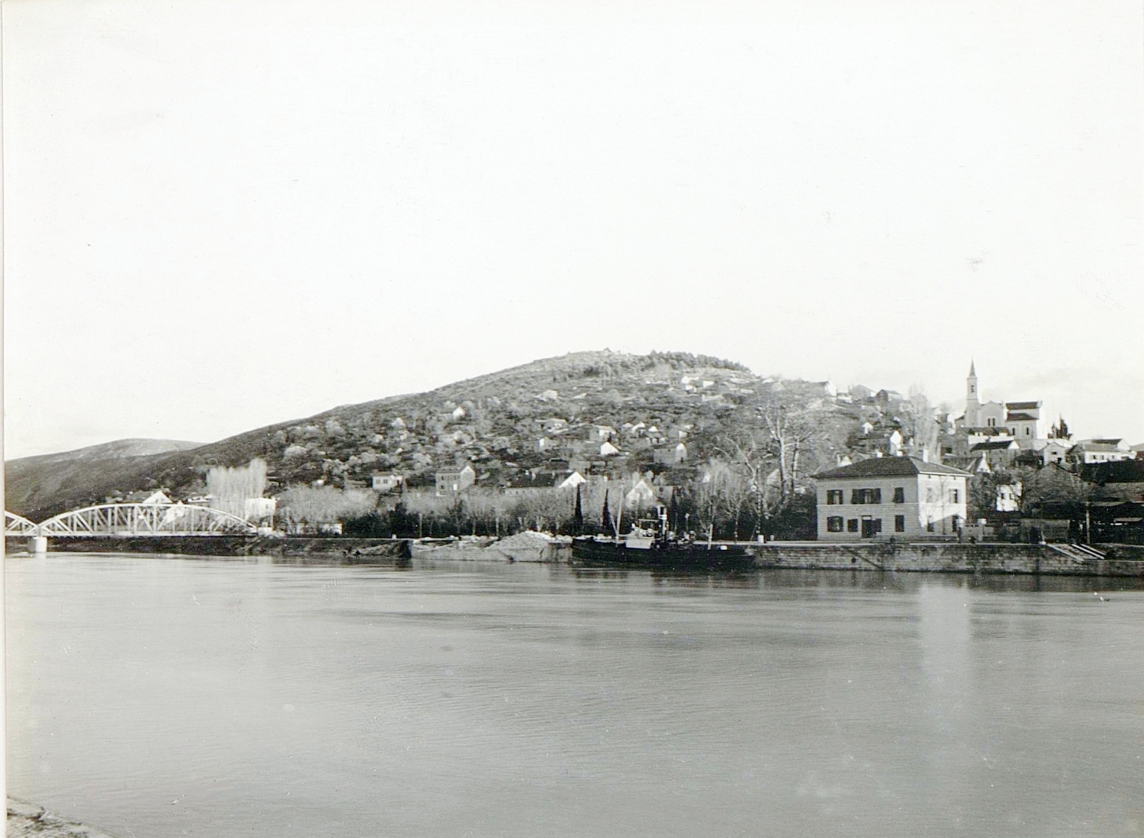 Metkovic. März 1916.